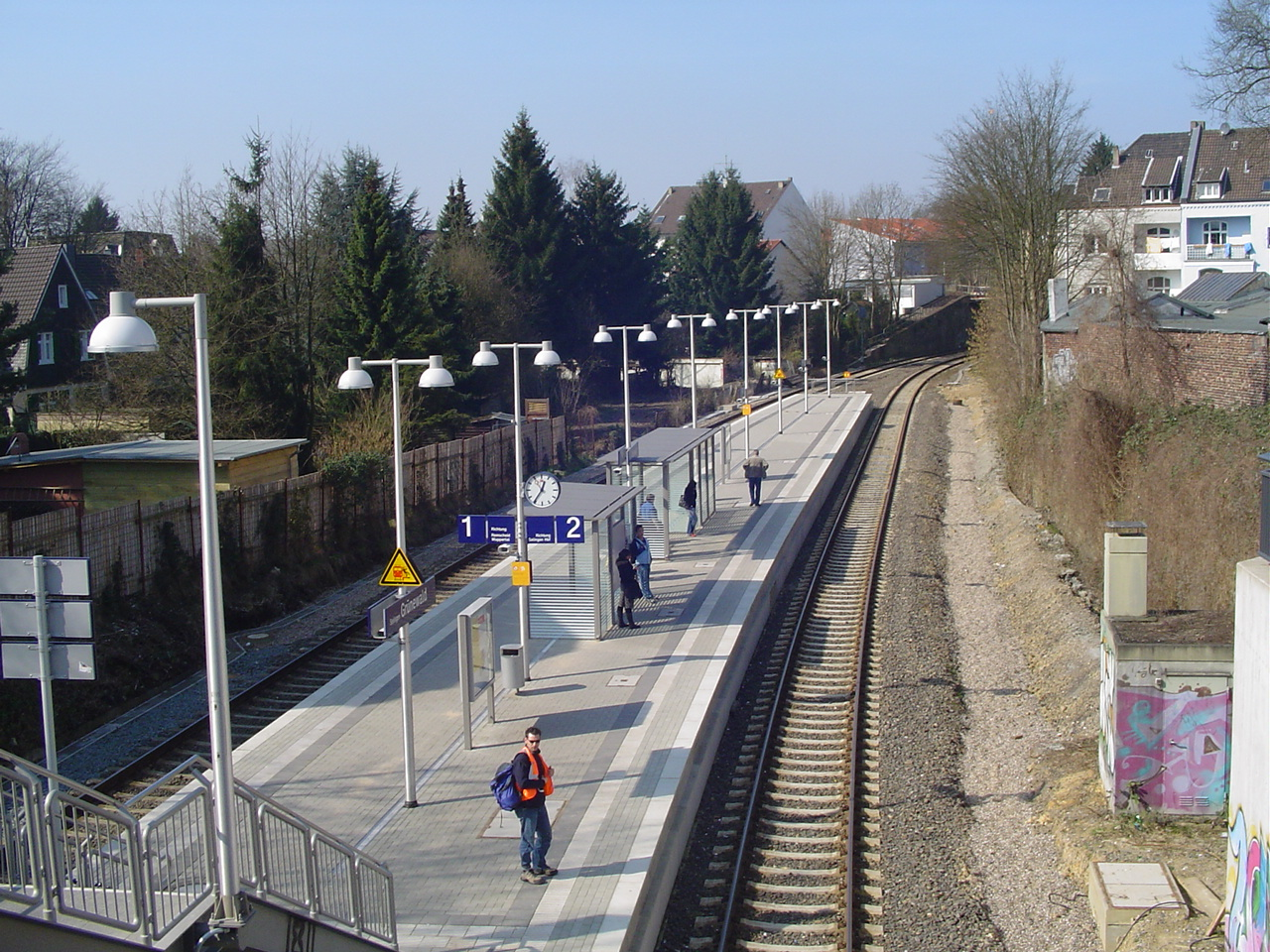 Bahnhof Solingen-Grünewald